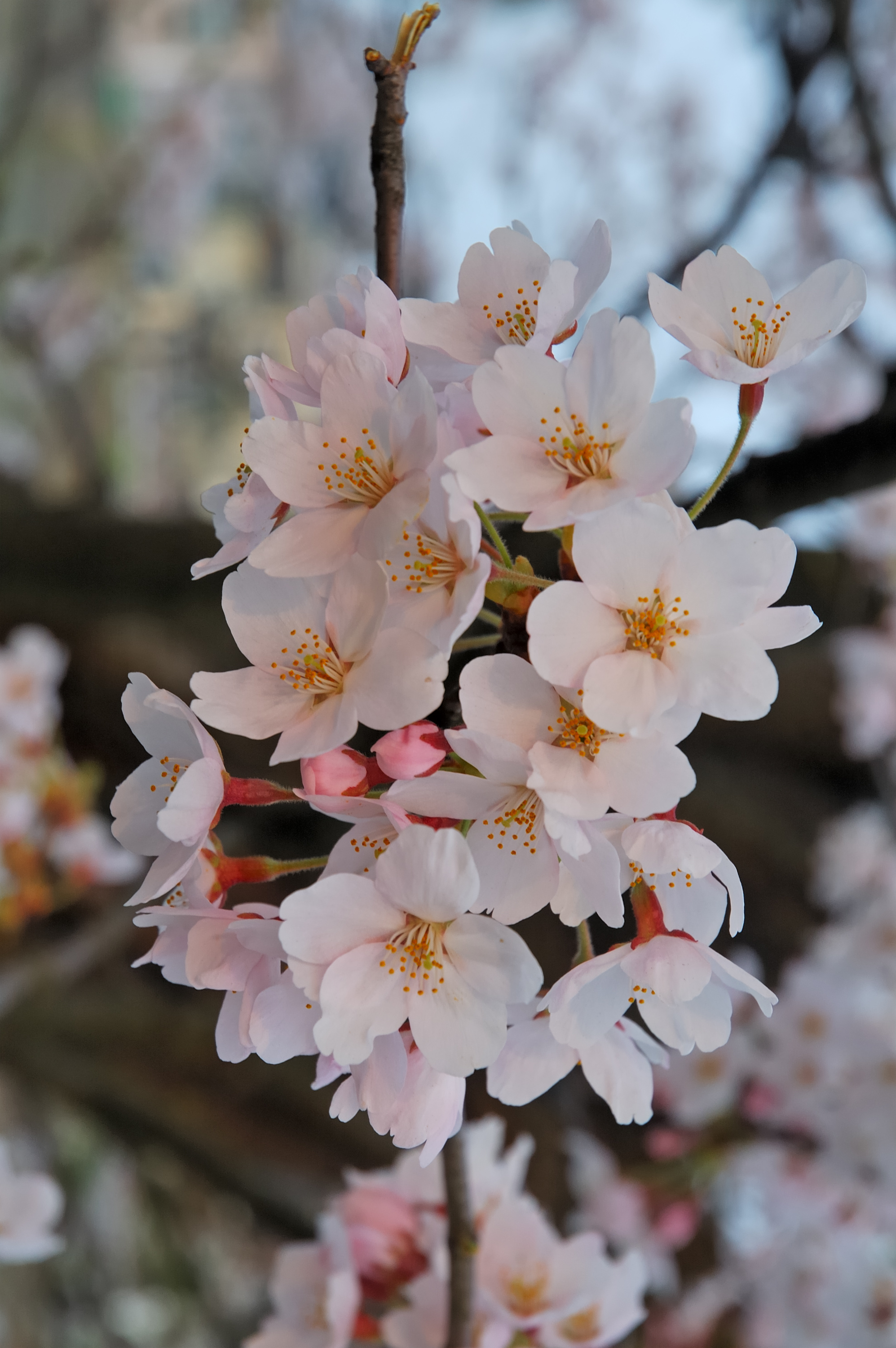 Sakura of Fukushima-e (福島江のサクラ)